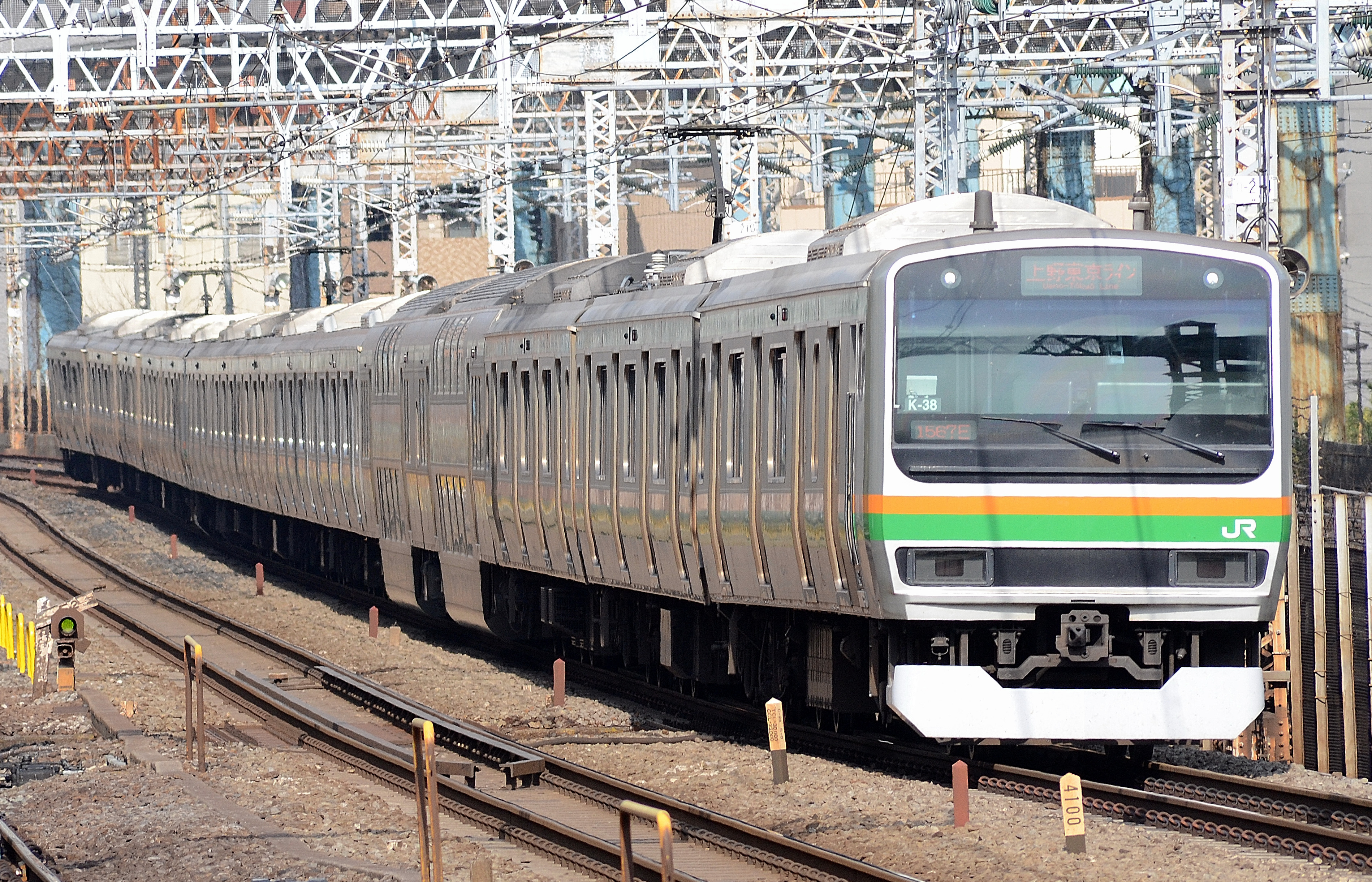 東海道線、新橋-品川間を走行する｢上野東京ライン｣のE231系